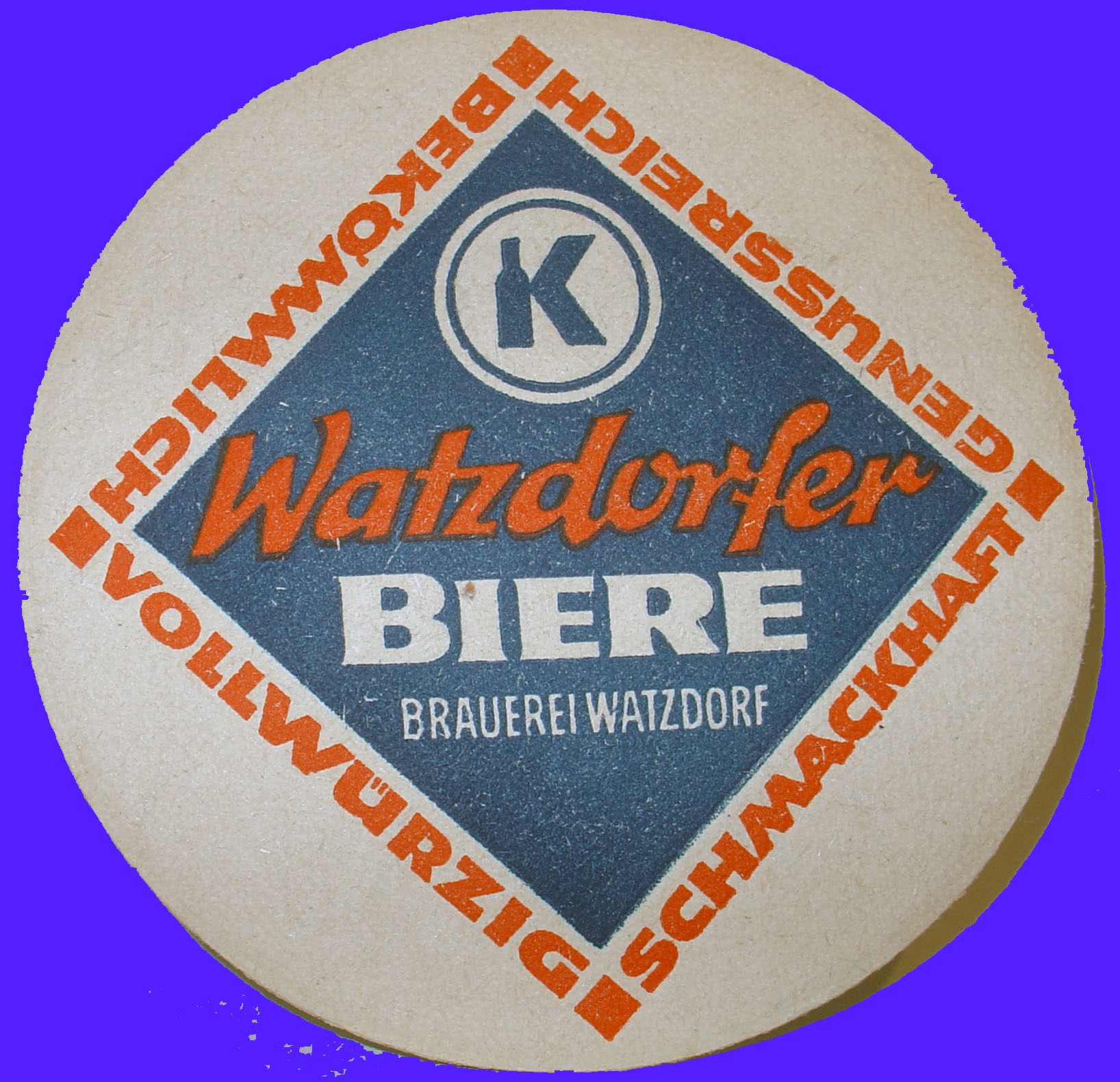 Watzdorfer Biere, Bierdeckel (DDR), Konsum